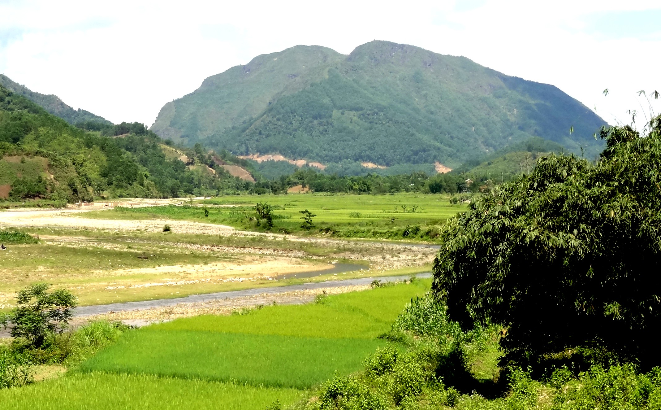 Hamburger Hill, depuis la route de A Lưới, avril 2011